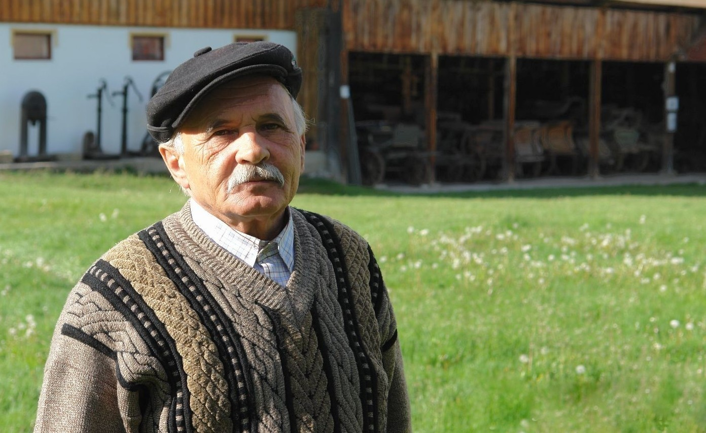 ifj. Haszmann Pál